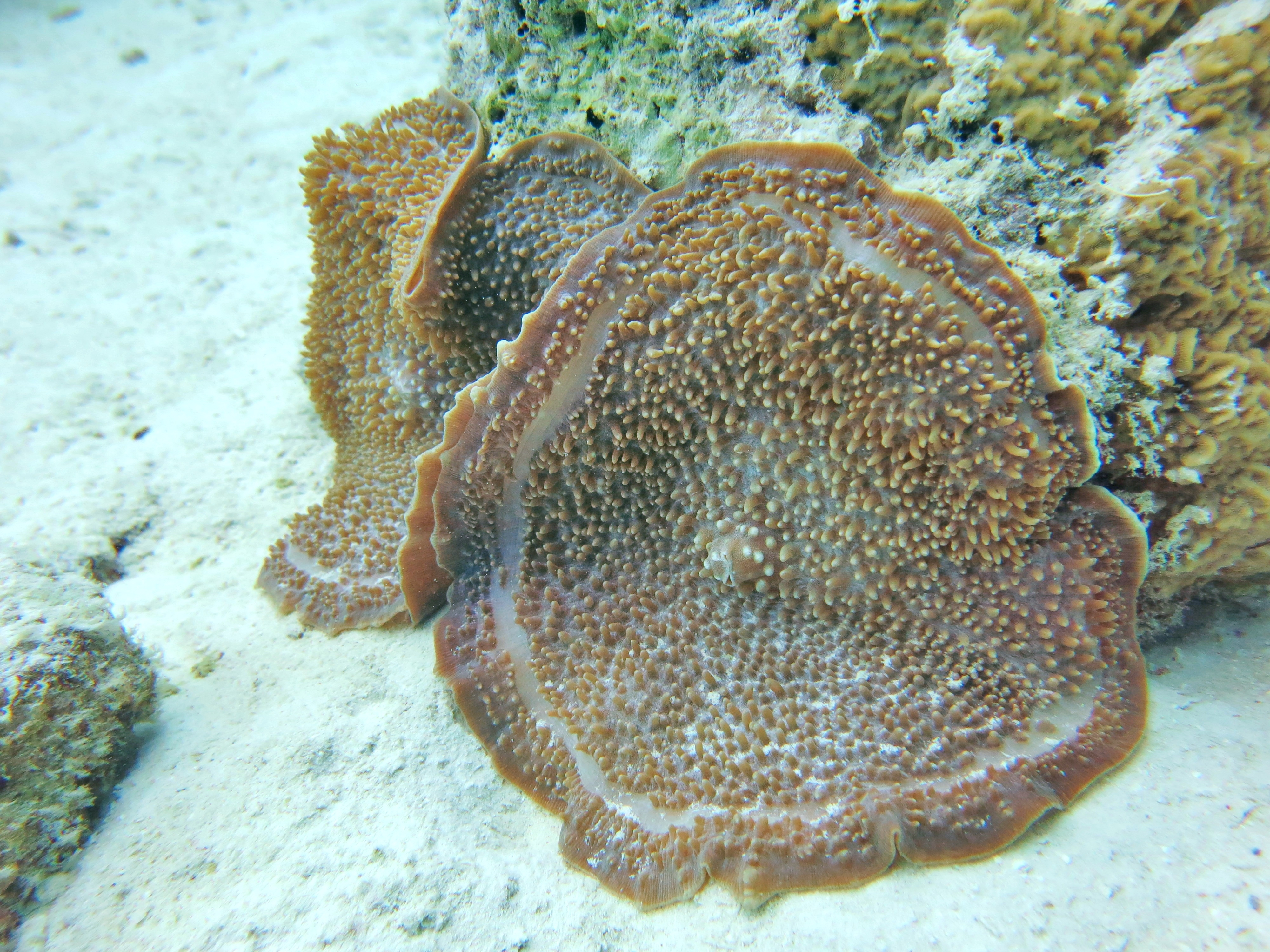 Une anémone oreille d'éléphant (Amplexidiscus fenestrafer) aux Maldives (atoll de Baa).